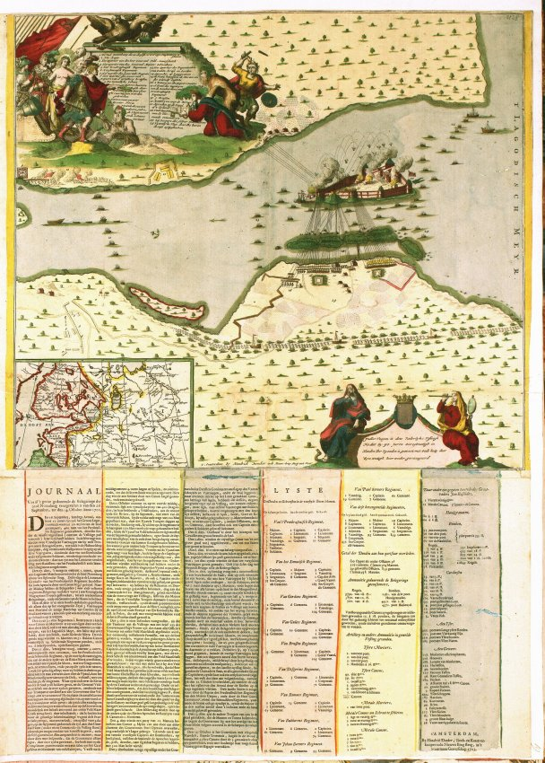 "Journal van al 't geene geduurende de Belegeringe der Stad Notenburg voorgvallen is van den 26. September tot den 14. October Anno 1702" Flugblatt zur Eroberung von Nöteborg (Schlisselburg) am Newa und Lagodasee durch die Russen, 1702 bildliche Darstellung der Beschießung der Festung Legende in holländischer SpracheText in holländischer Sprache Auflistung der Zahl der Gefallenen und des Materialeinsatzes Nebenkarte: Finnischer Meerbusen mit Schweden, Russland und Kurland Kupferstich, koloriert